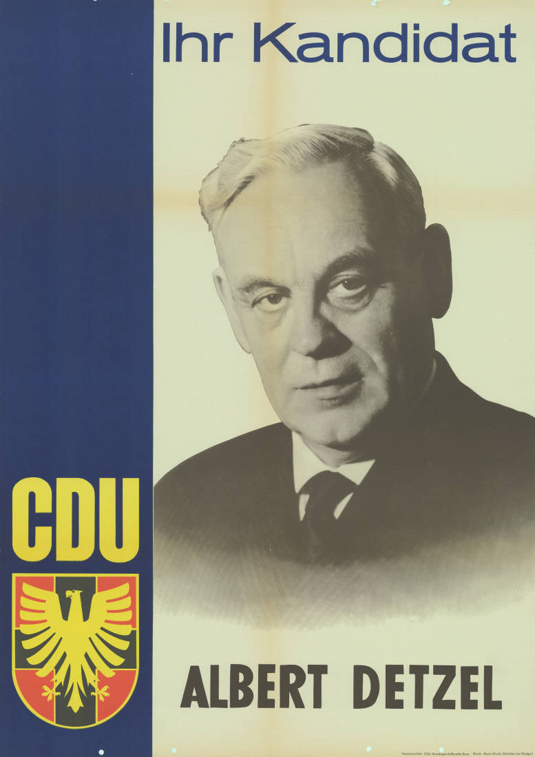 Ihr Kandidat CDU Albert Detzel Abbildung: Porträtfoto Kommentar: Rückseitig rot beschriftet. Plakatart: Kandidaten-/Personenplakat mit Porträt Auftraggeber: Verantw.: CDU-Bundesgeschäftsstelle Bonn Drucker_Druckart_Druckort: Repro-Druck, Schmiden bei Stuttgart Objekt-Signatur: 10-010 : 220 Bestand: Landtagswahlplakate Rheinland-Pfalz (10-010) GliederungBestand10-18: Landtagswahlplakate Rheinland-Pfalz (10-010) » CDU Lizenz: KAS/ACDP 10-010 : 220 CC-BY-SA 3.0 DE